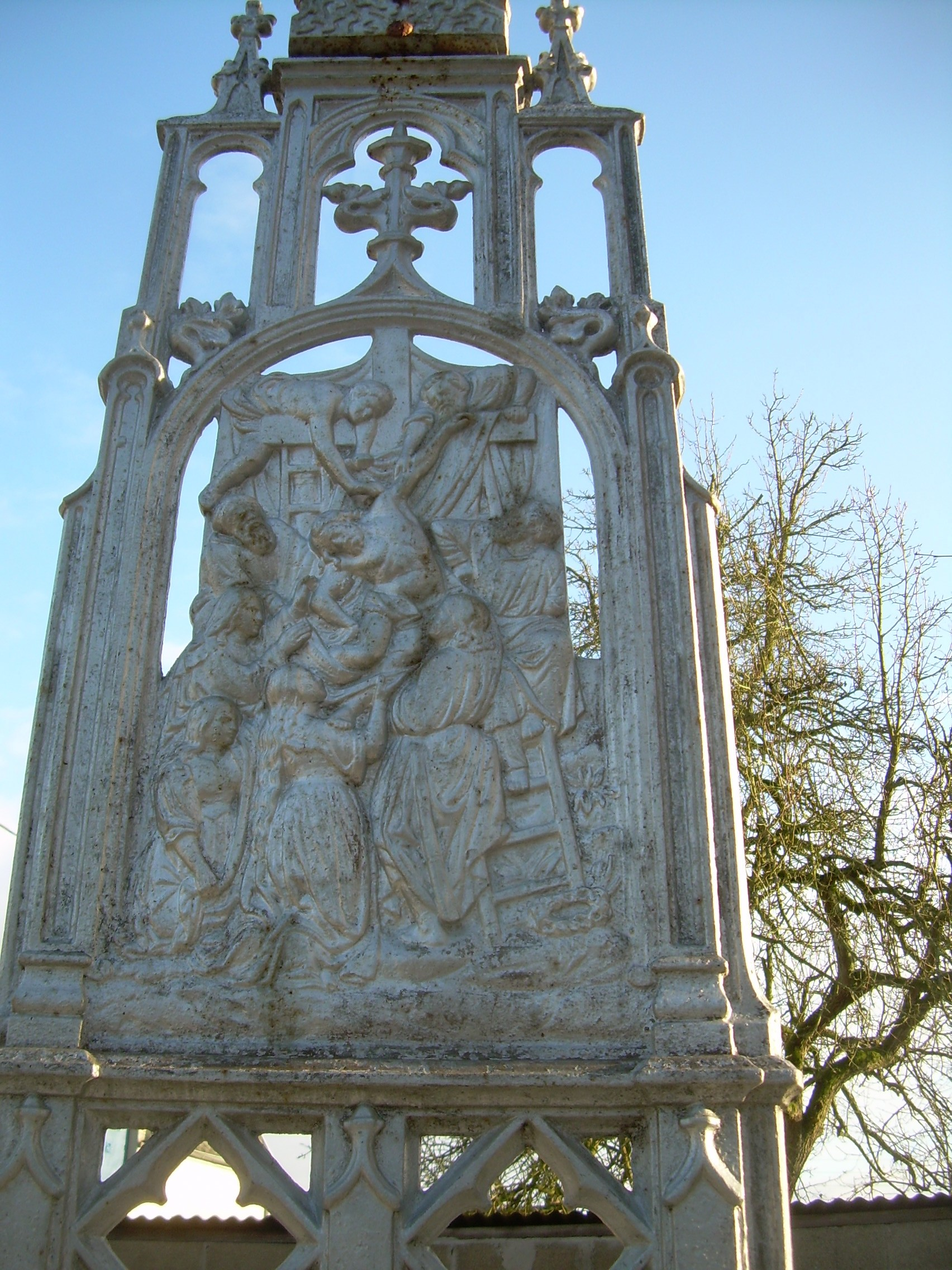 Calvaire de Chaillevois